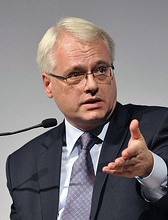 Ivo Josipović sudjelovao je danas na sučeljavanju predsjedničkih kandidata u sklopu ‘Weekend sessiona’ u Zagrebu. Sučeljavanju na temu “Tko je hrvatski Obama” prisustvovali su i Vesna Pusić, Vesna Škare Ožbolt te Andrija Hebrang. Više informacija pročitajte na